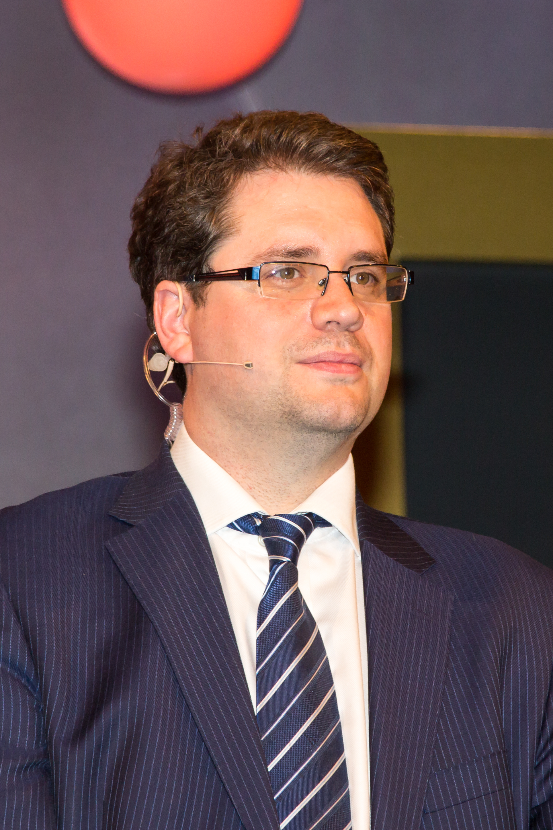 Verleihung des Hanns-Joachim-Friedrichs-Preises 2015 in Köln: Eliot Higgins